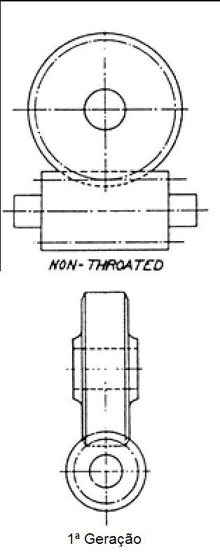 Primeira geração